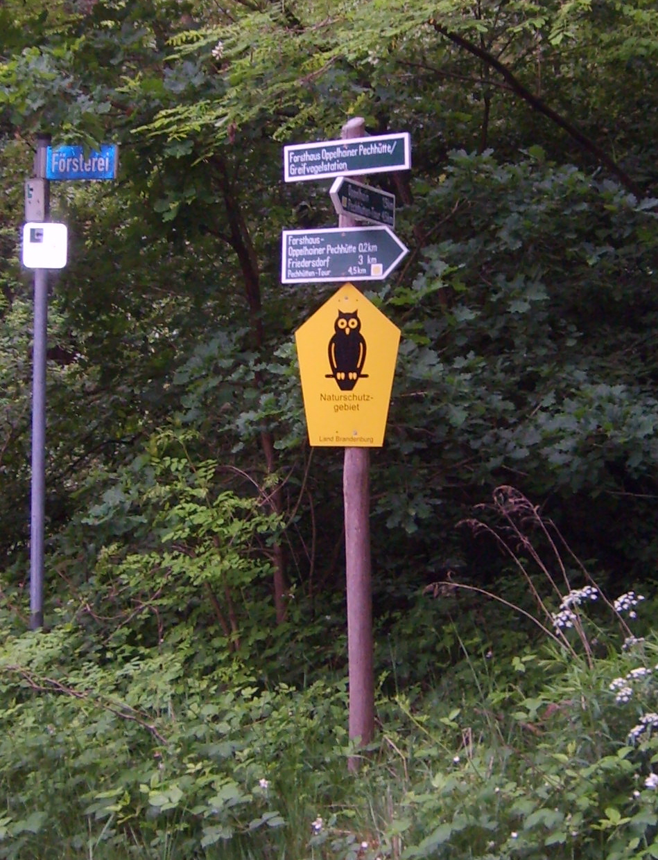 Wegweiser Oppelhain Pechhütte